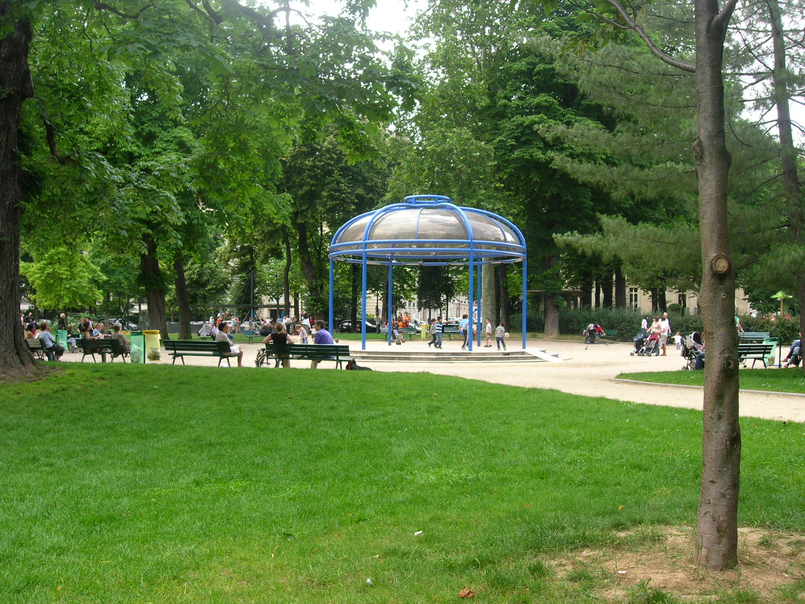 Jardin du Ranelagh dans le 16e arrondissement de Paris